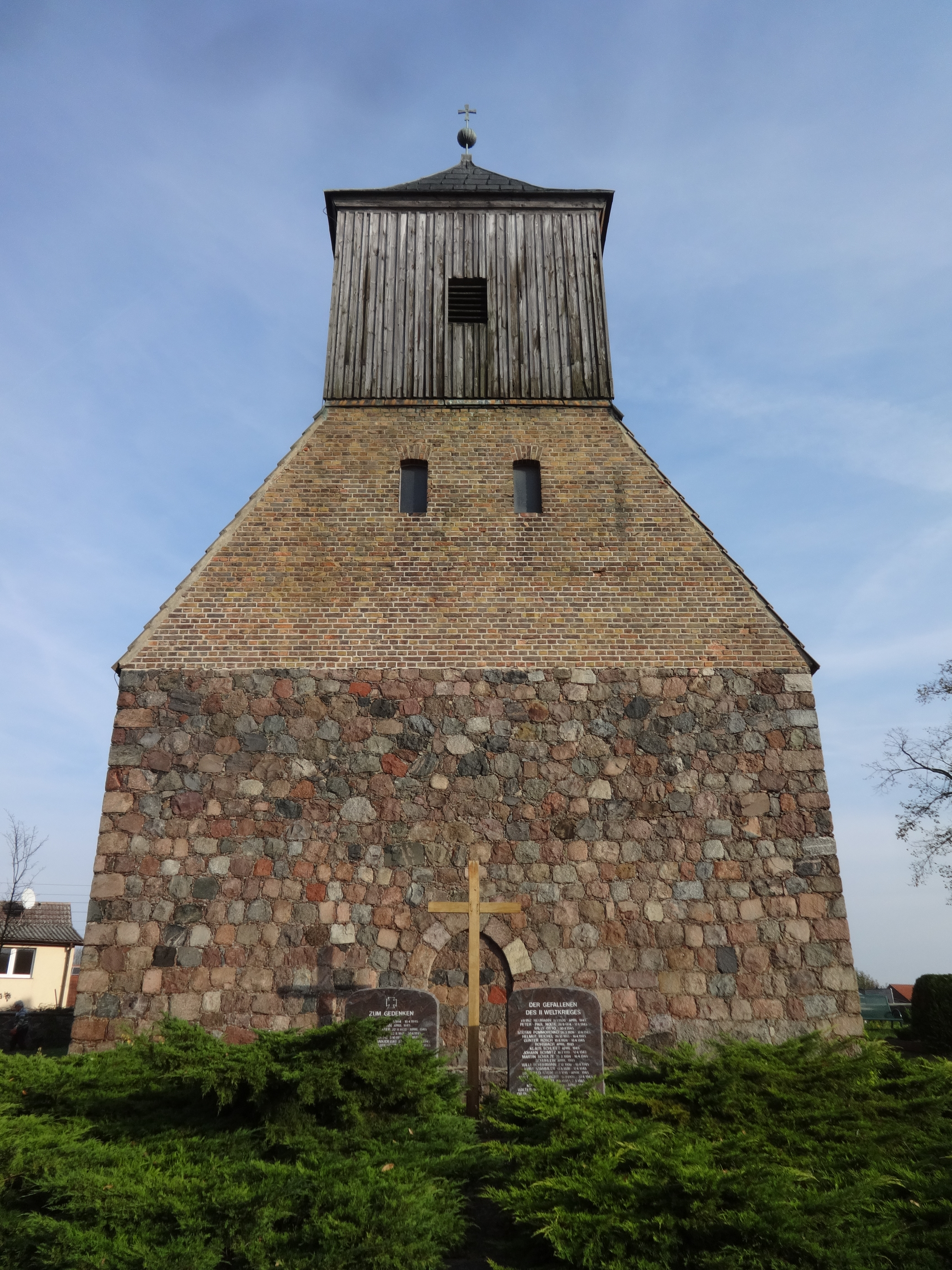 Die Dorfkirche in Münchehofe, einem Ortsteil der Gemeinde Müncheberg im Landkreis Oder-Spree, entstand in der zweiten Hälfte des 13. Jahrhunderts. Zu einem späteren Zeitpunkt kam der Westturm hinzu.